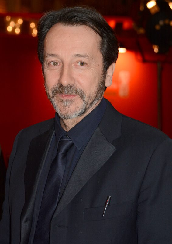 Jean-Hugues Anglade à la cérémonie des César.